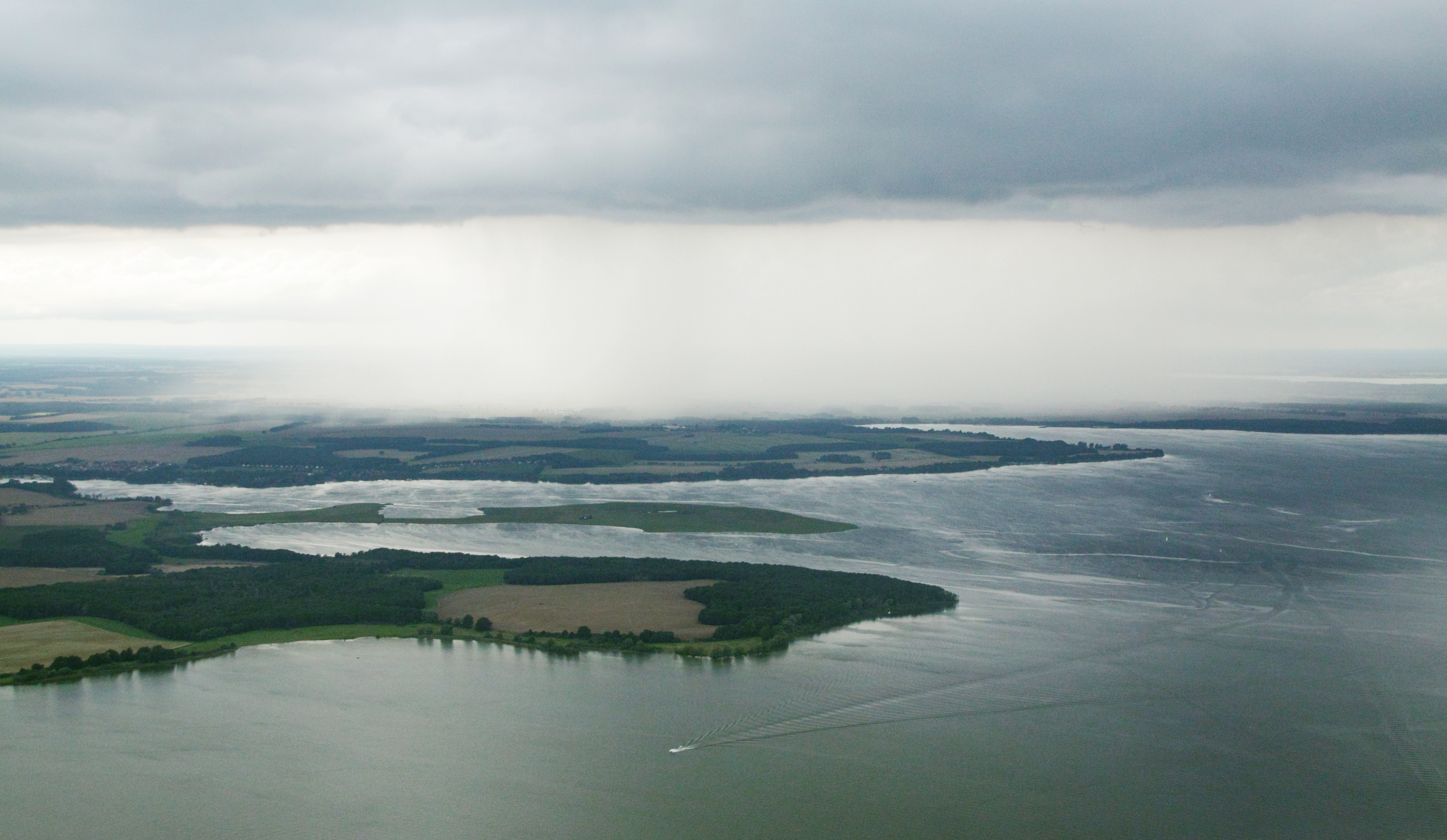 Fotoflug Waren (Müritz) und Umgebung: Müritz mit Naturschutzgebiet Großer Schwerin mit Steinhorn